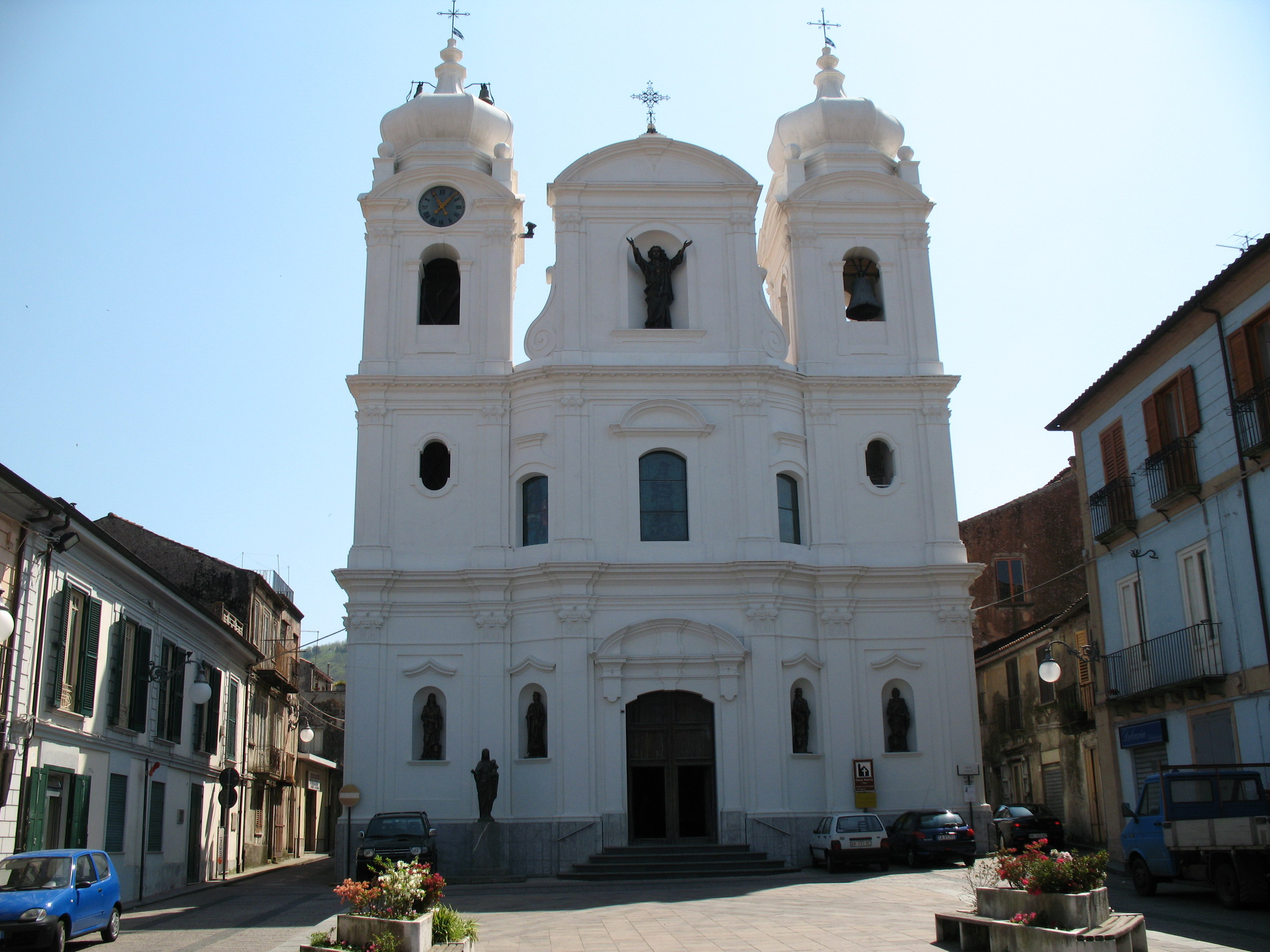 Foto della Chiesa Matrice di Cittanova